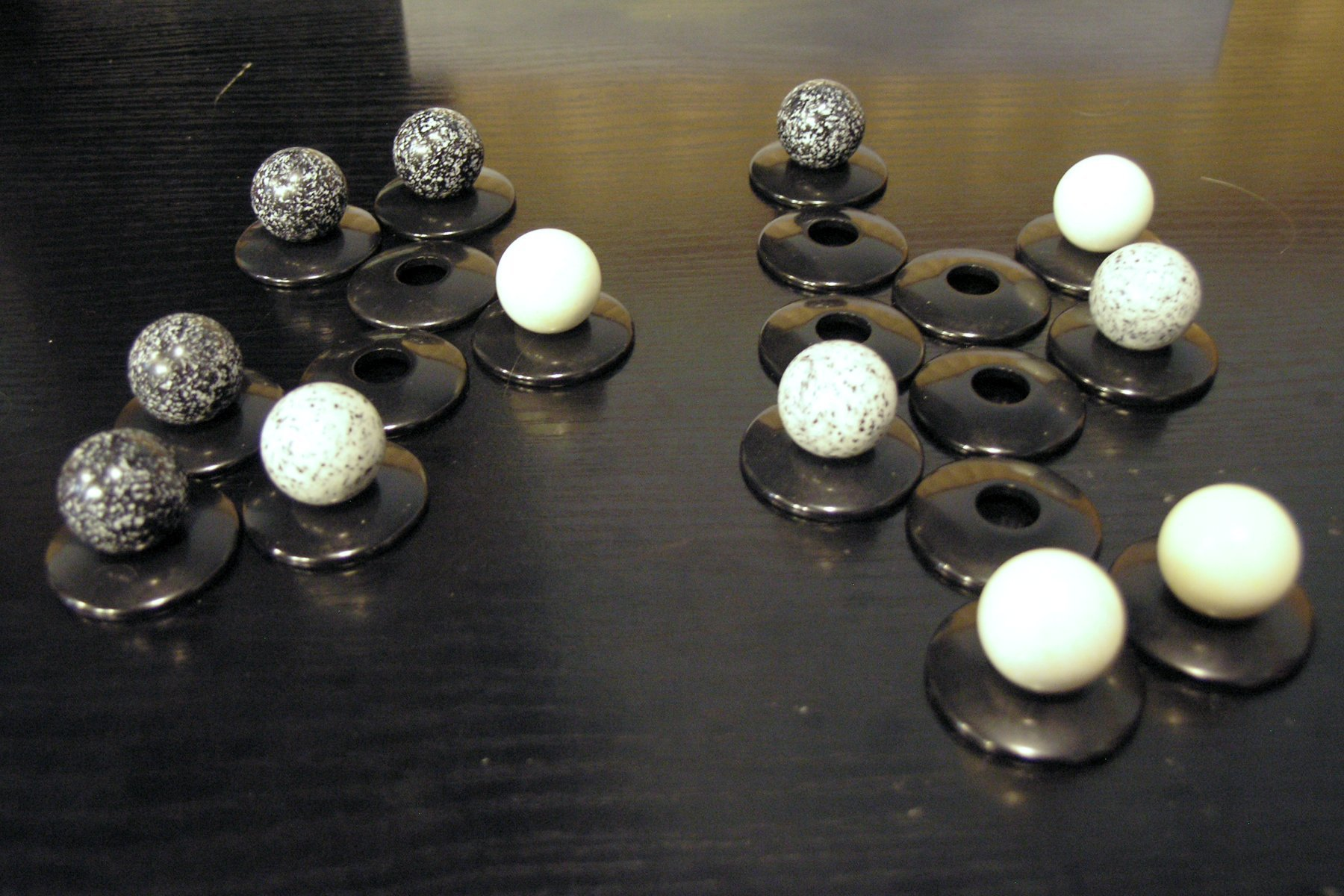 ZÈRTZ